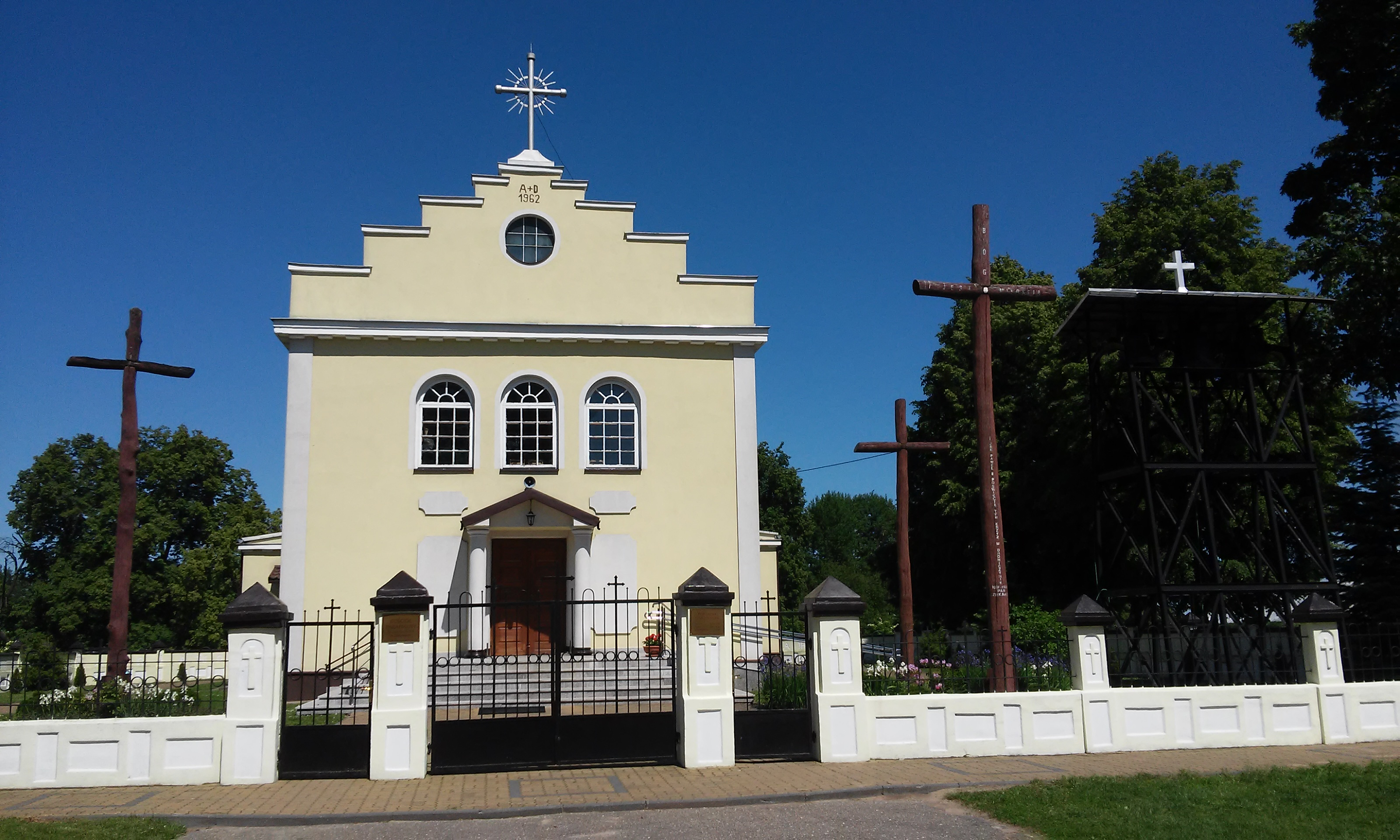 Czekanów - rzymskokatolicki kościół parafialny pw. św. Andrzeja Boboli, 1953-1956